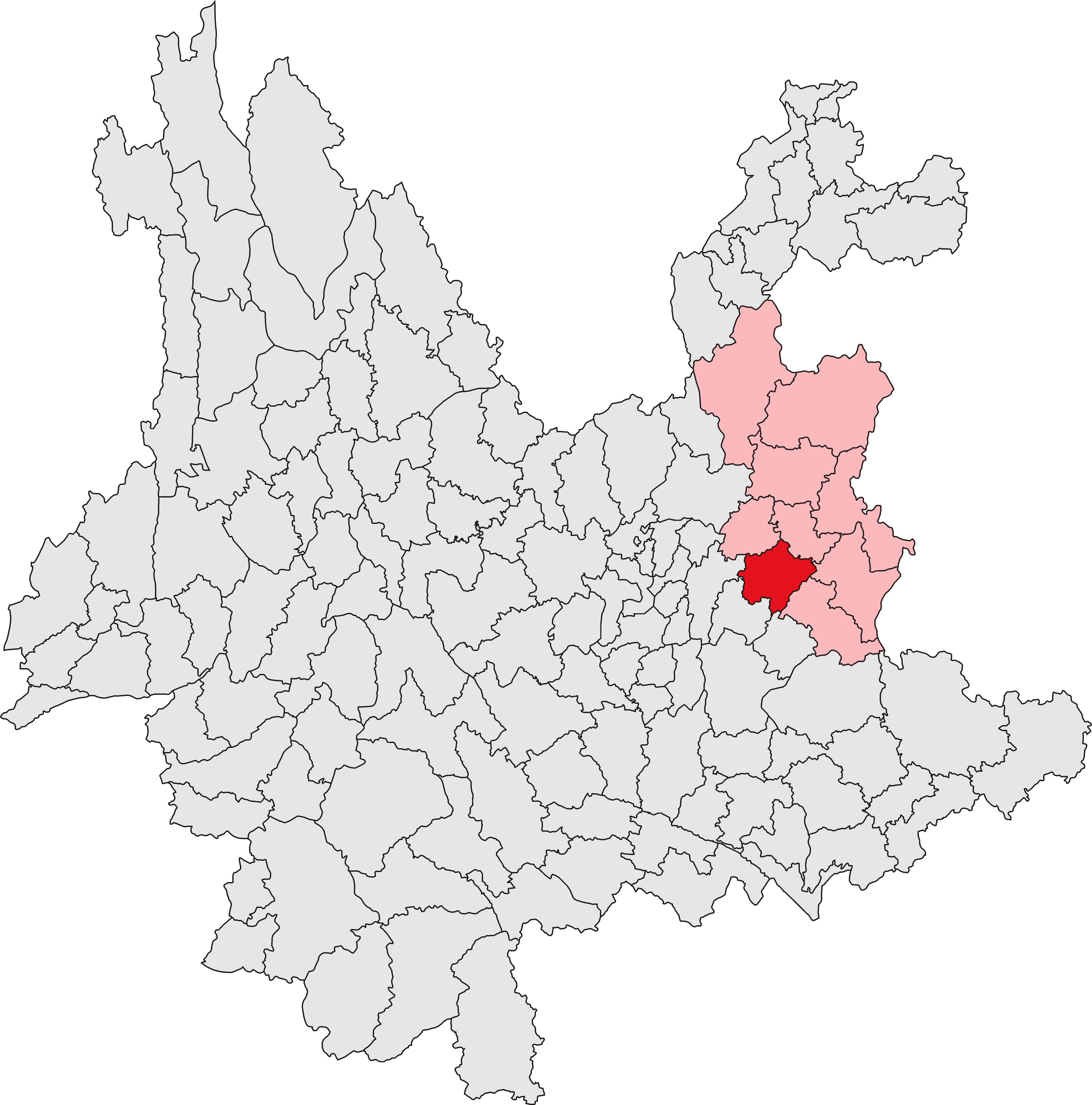 陆良县位置图